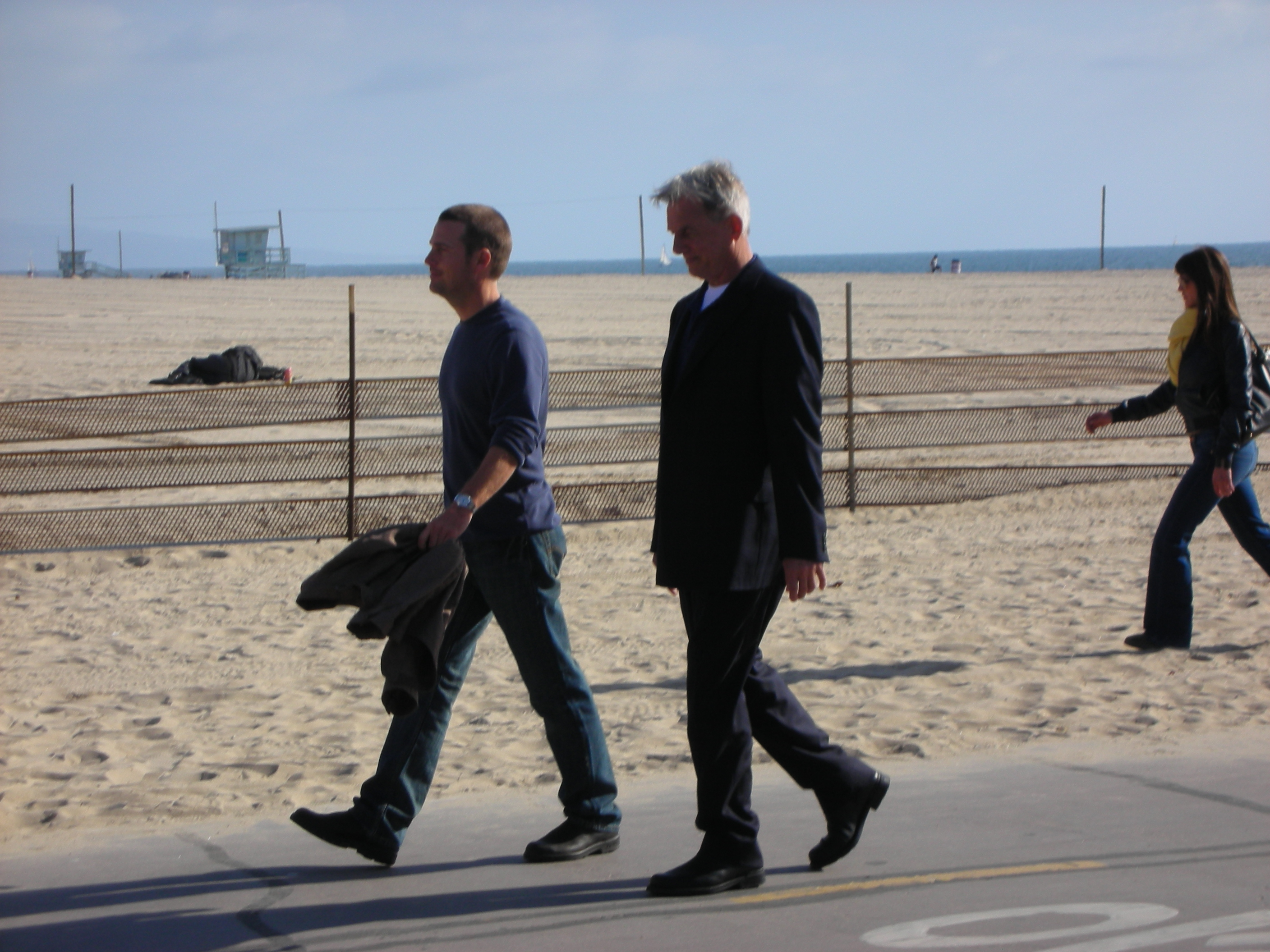 NCIS Filming